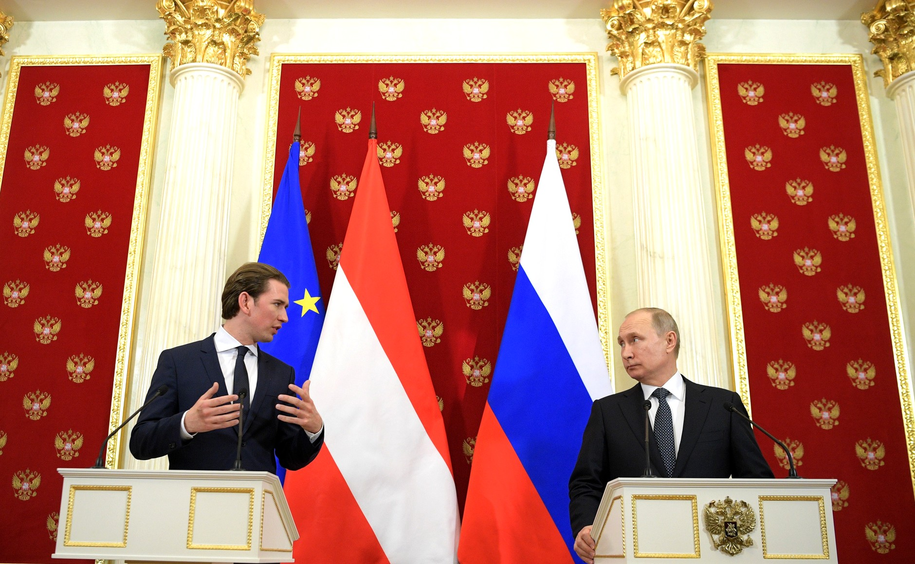 Совместная пресс-конференция Президентома России Владимира Путина и Федерального канцлера Австрии Себастиана Курца